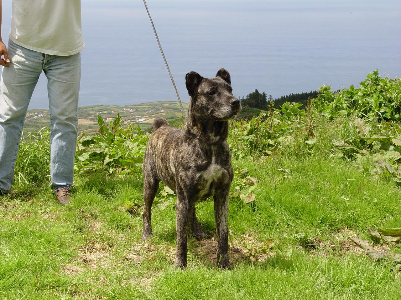 Casa da Praia Kennels